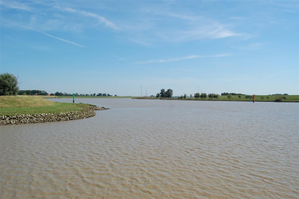 De Eems bij de haveningang van Weener.